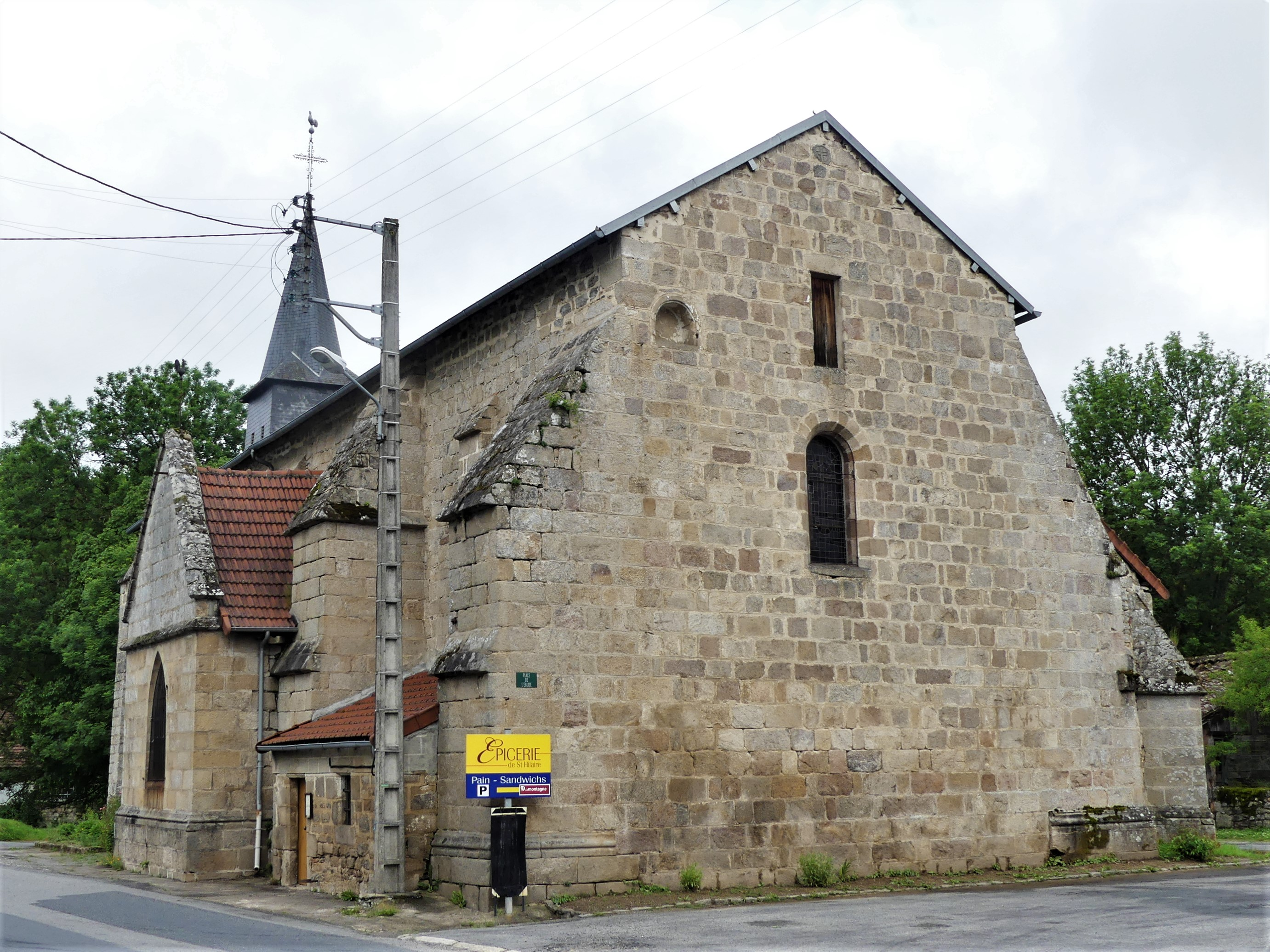 L e chevet de l'église, Saint-Hilaire-le-Château, Creuse, France.